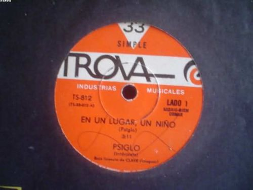 Disco de vinilo 7" del grupo uruguayo Psiglo